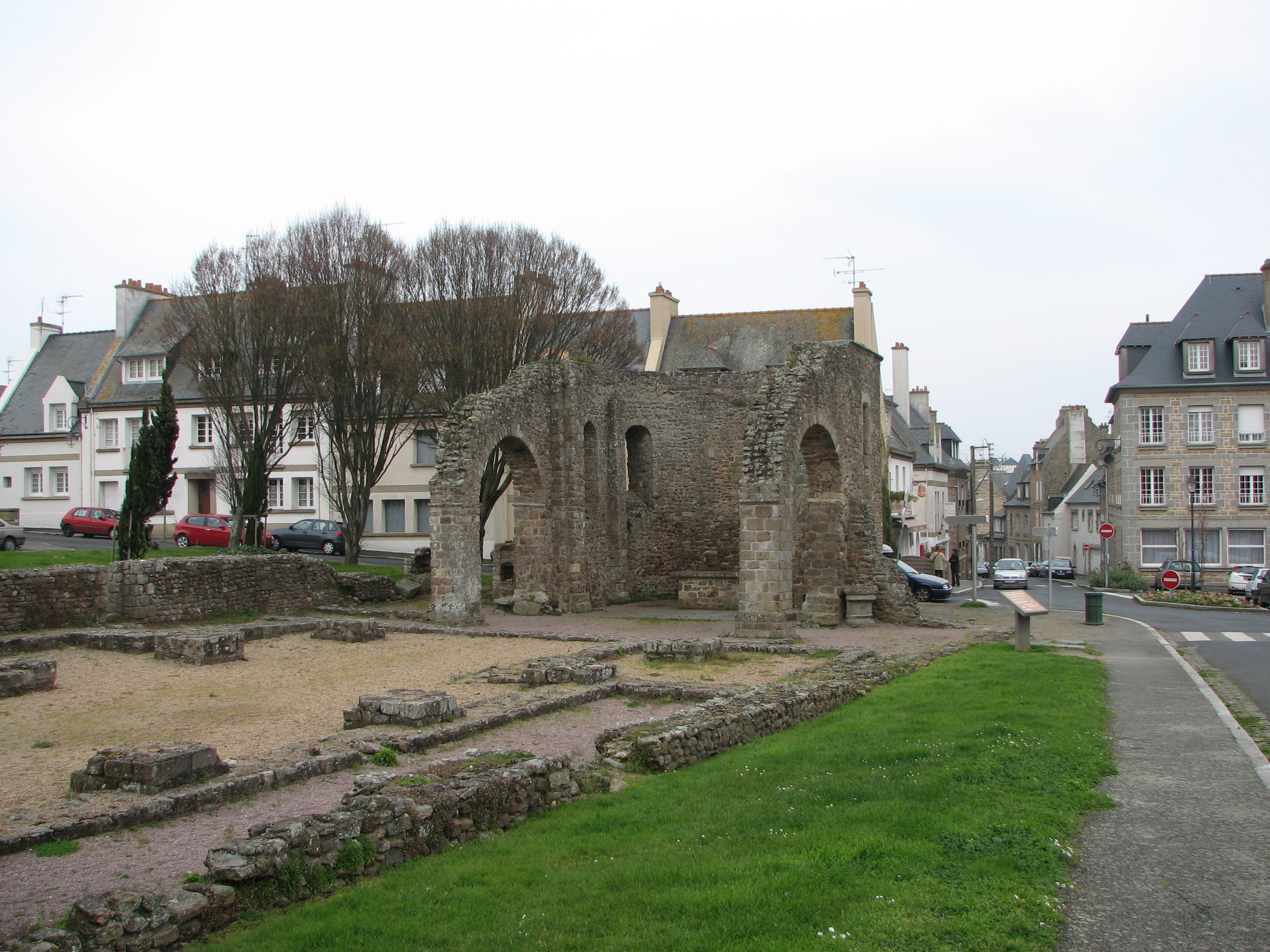 Ruines de la chapelle d'Aleth, à la cité d'Aleth, Saint-Servan, Saint-Malo